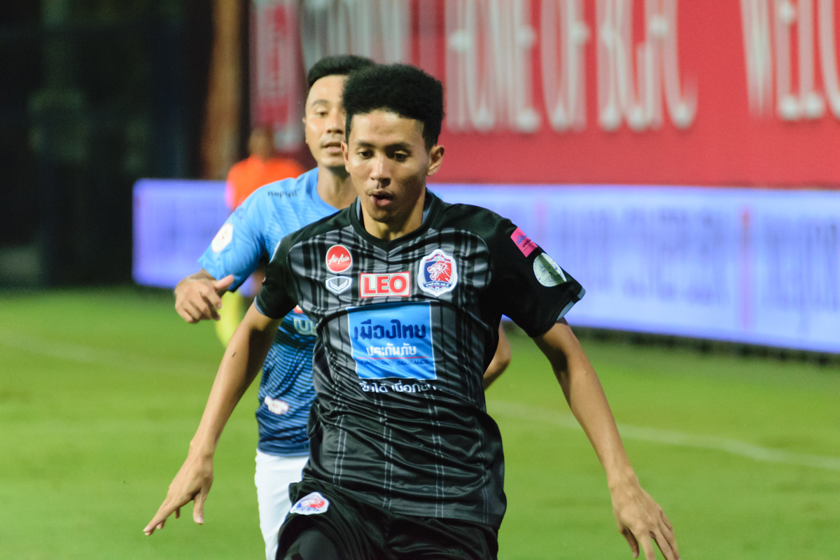 Bodin Phala